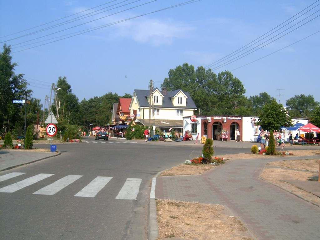 Pustkowo - główna ulica